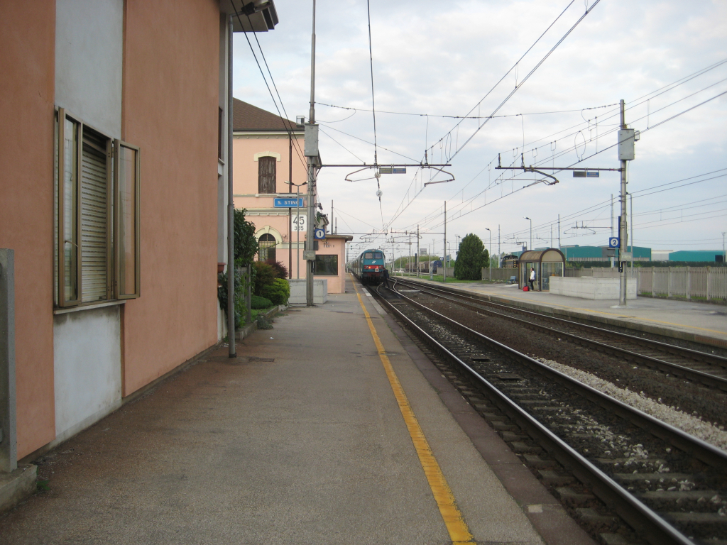 Stazione di Santo Stino di Livenza